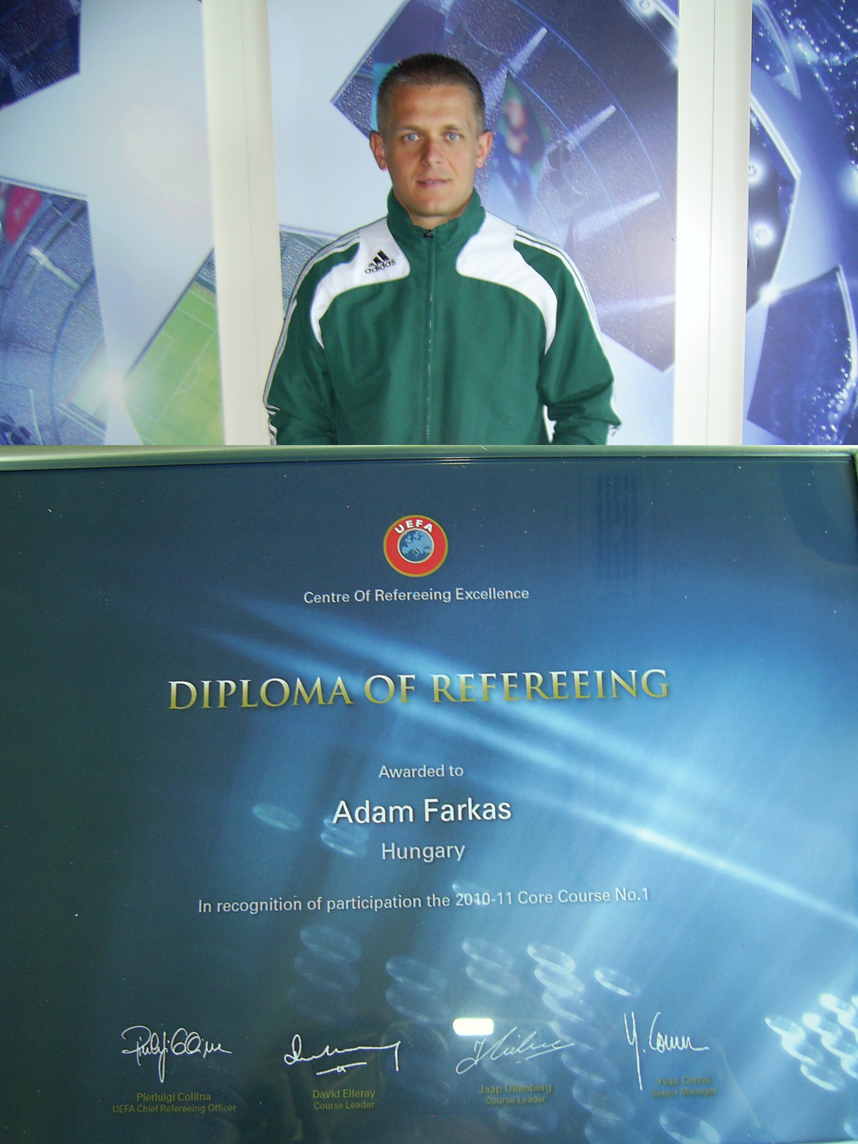 Farkas Ádám labdarúgó-játékvezető és UEFA-diplomája, Nyon, Franciaország